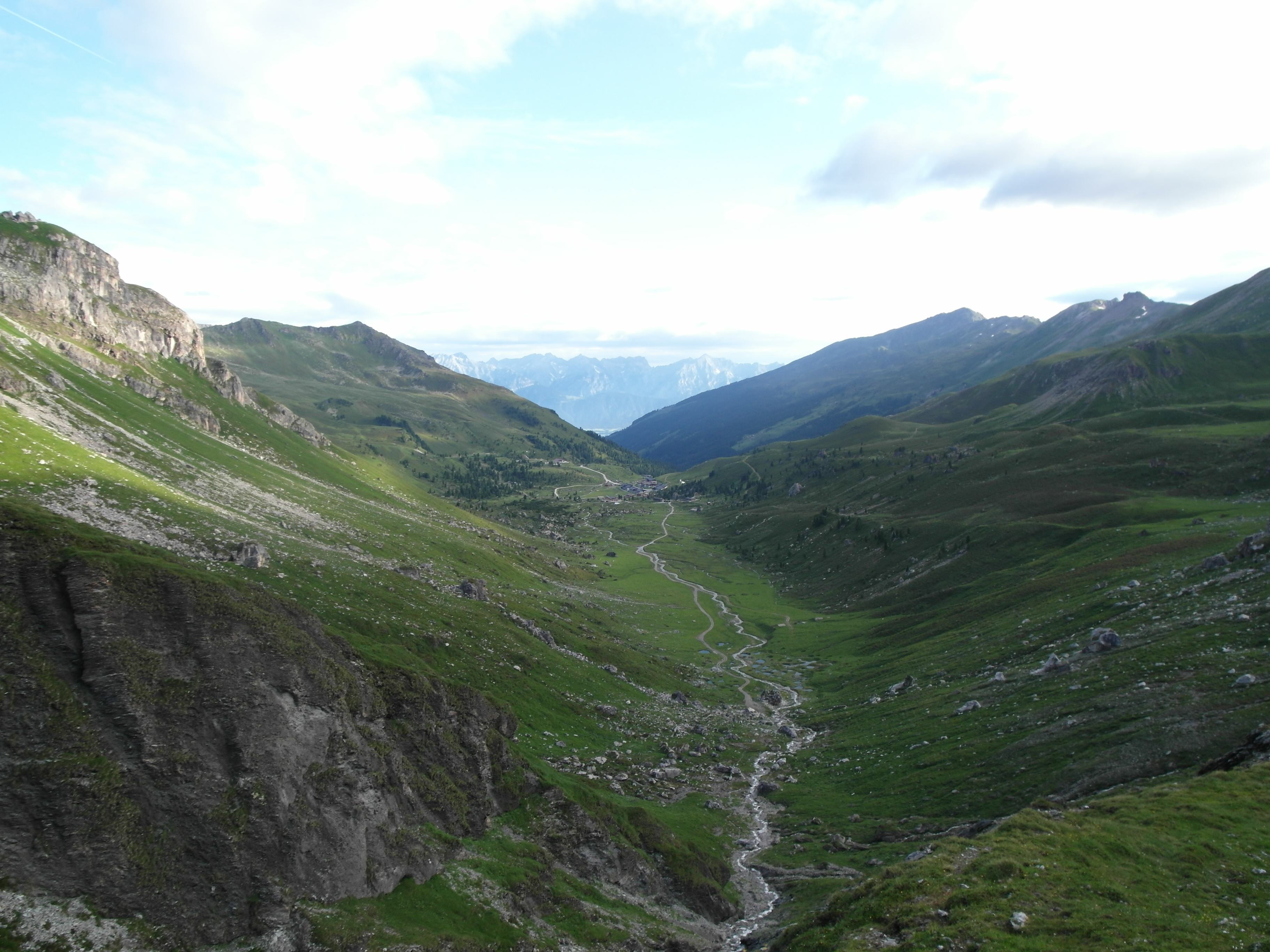 Der Talschluss des Wattentals von Richtung Pluderlingssattel aus gesehen.